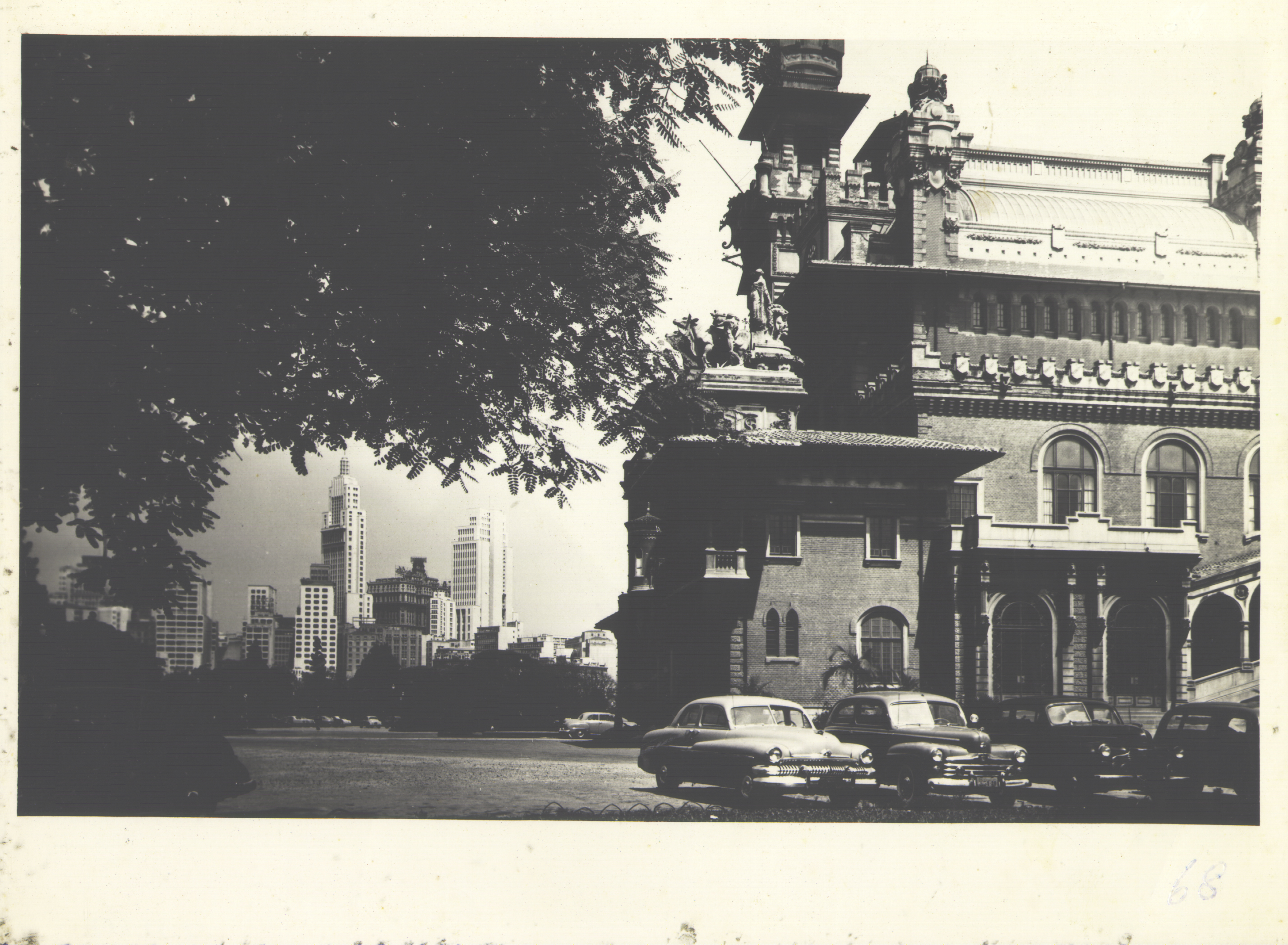 Obra que integra o acervo do Museu Paulista da USP. Coleção Werner Haberkorn